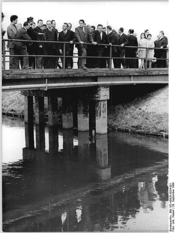 Georg Ewald bei Einweihung einer Melioration Zentralbild Link 9.9.69-kie Bez. Potsdam: G. Ewald bei Übergabe des Meliorationsvorhabens "Großbeerener Graben" Ein über 2000 Hektar großes Teilobjekt des Meliorationsvorhabens "Großbeerener Graben" im Kreis Zossen wurde am 29.9.69 im Beisein von Minister Georg Ewald, Kandidat des Politbüros des ZK der SED und Vorsitzender des Rates für Landwirtschafltiche Produktion und Nahrungsgüterwirtschaft der DDR, seiner Bestimmung übergeben.